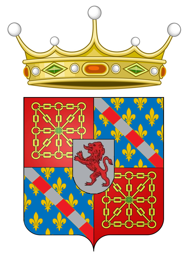 Escudo del Vizcondado de Val de Erro